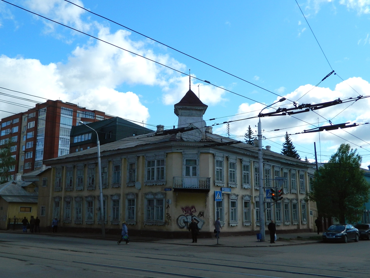 Дом Бухартовских в Уфе (bashkir: Бухартовскийҙар йорто)